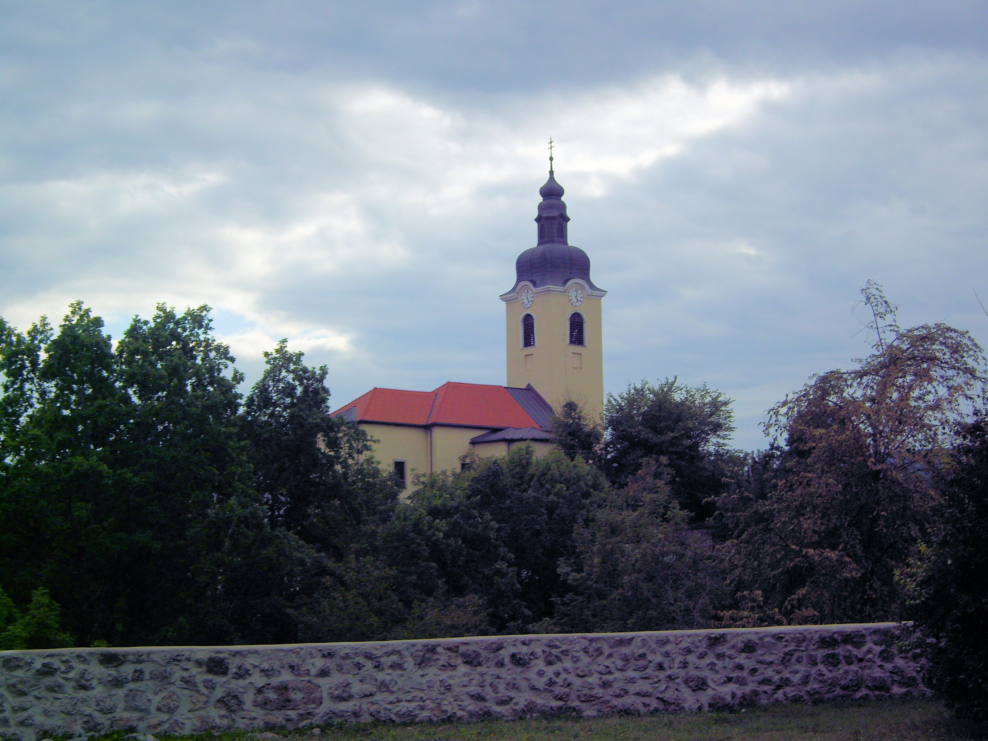 Die Kirche wird bereits im Mittelalter (1349) erwähnt. Grabmal vom adligen kroatischen Ban Nikola Tomasic